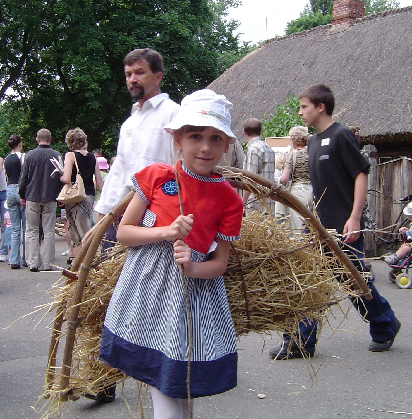 Piknik w Skansenie w Toruniu; dziewczynka niesie słomę w rezginii.